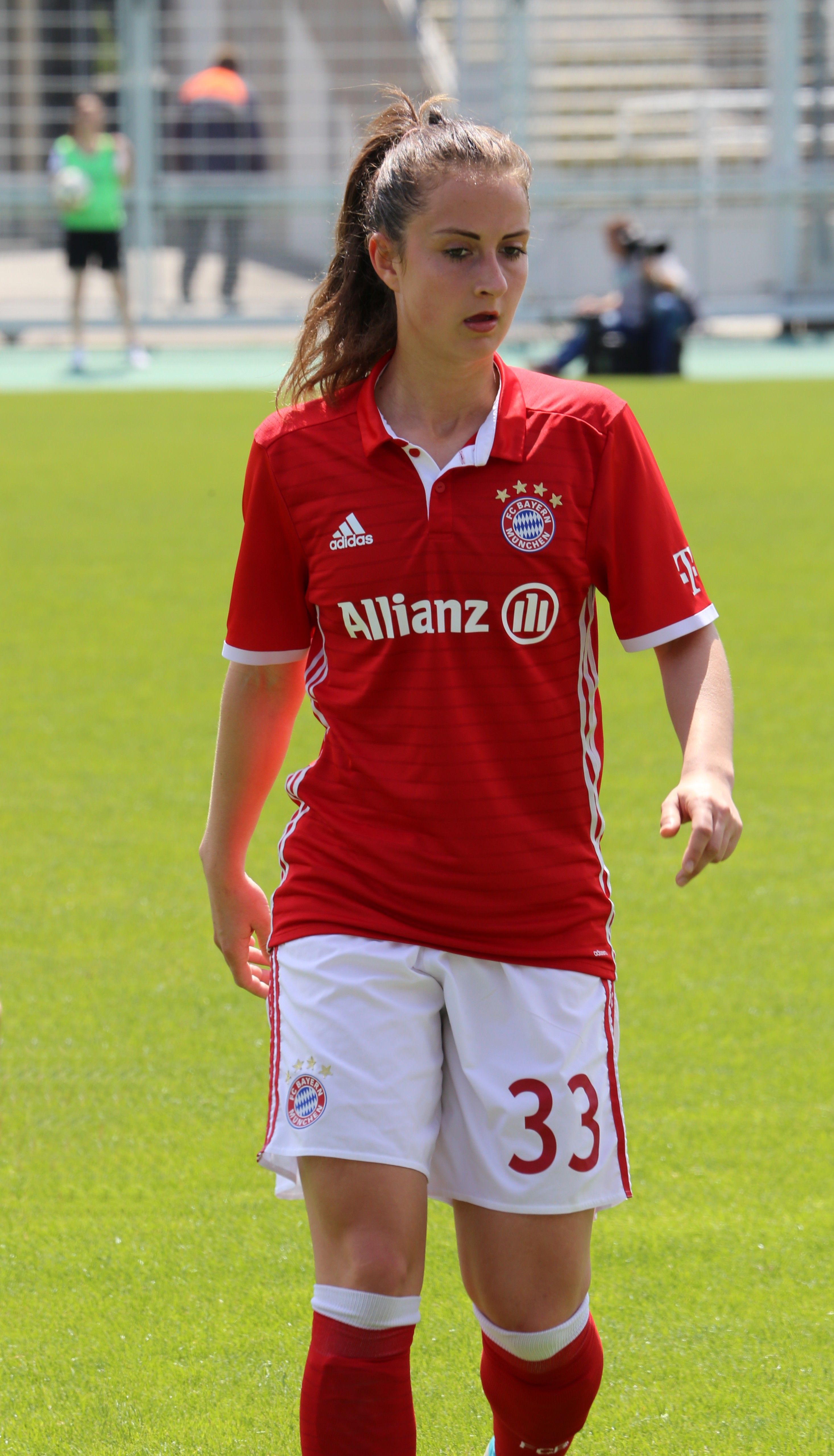 Sara Däbritz (FC Bayern München) beim Frauen-Bundesliga-Spiel FC Bayern München gegen SGS Essen am 21. Mai 2017 im Stadion an der Grünwalder Straße (Ergebnis war 2:0)